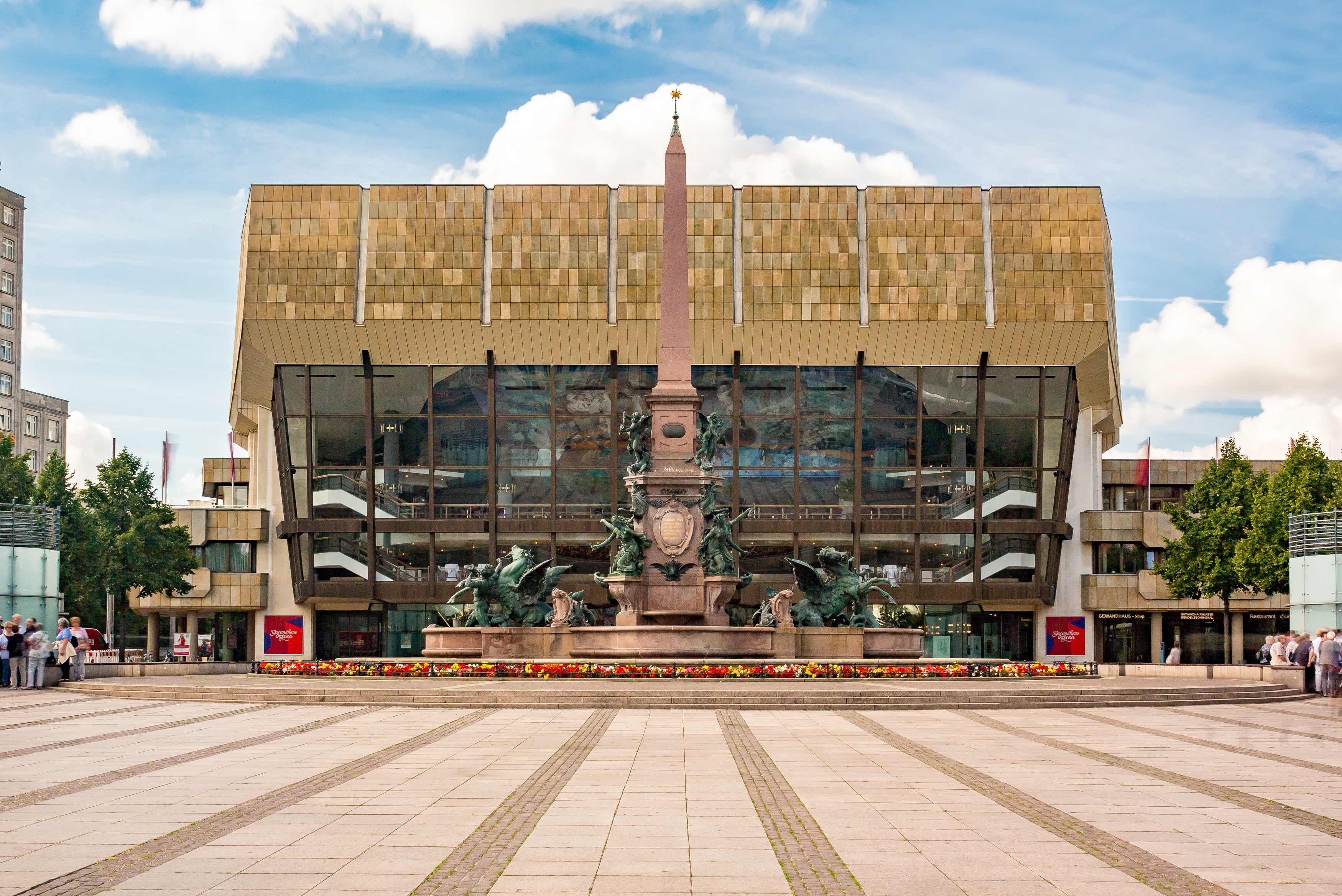 Das Gewandhaus am Augustusplatz in der Innenstadt von Leipzig, im Vordergrund der Mendebrunnen.